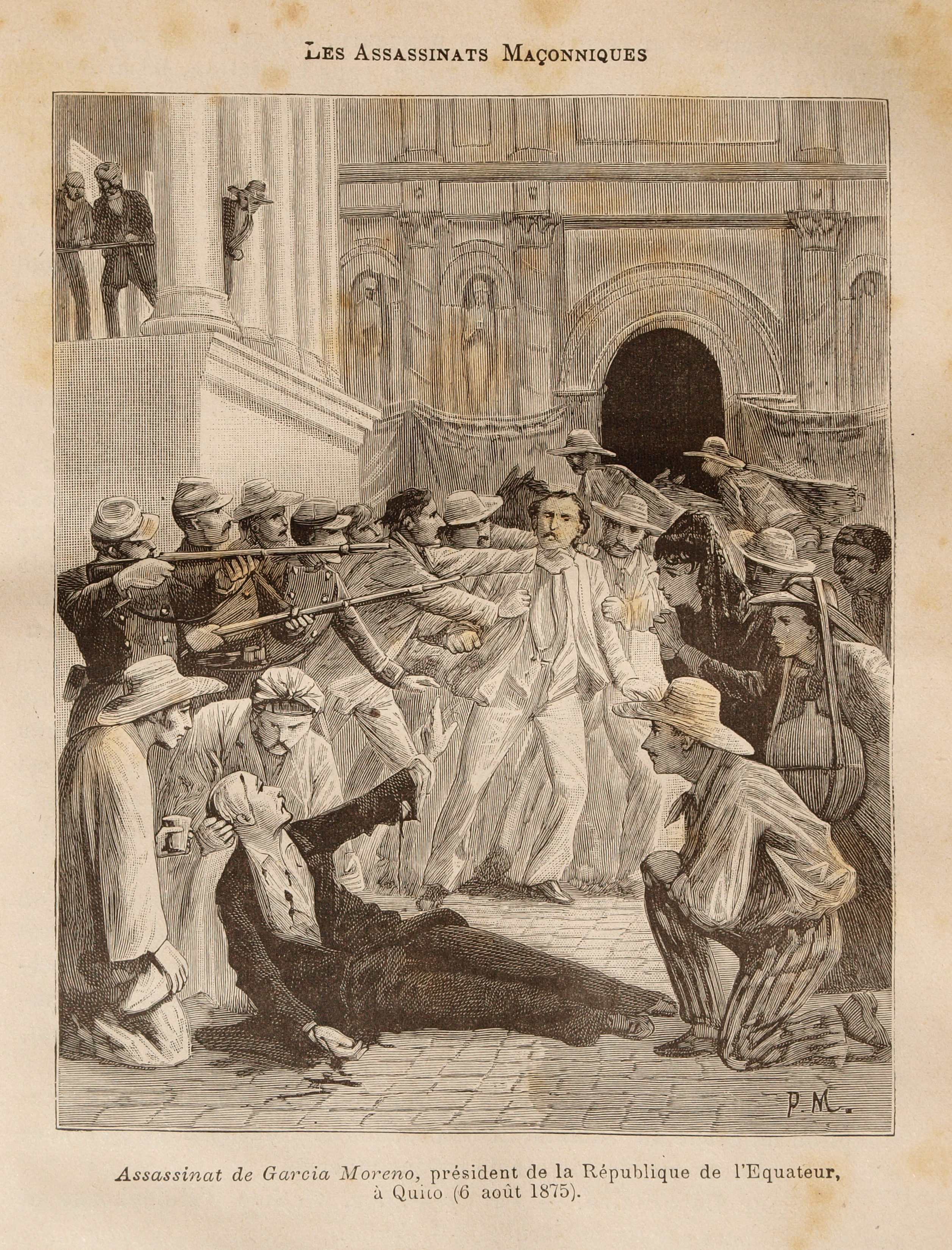 Une des gravures du document de Léo Taxil, Les Mystères de la Franc-Maçonnerie, Paris, 1886.